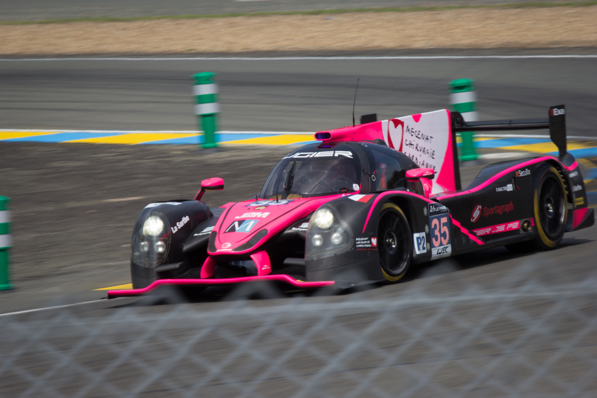 Oak Racing - Ligier JS P2 Nissan #35